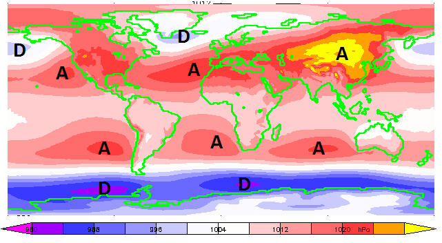 Pression moyenne au niveau de la mer montrant la positions des anticyclones (A) et des dépressions (D) semi-permanentes durant les mois de décembre, janvier et février. Ces entités météorologiques, appelées centres d'action sont créés par la circulation atmosphérique générale, la température des mers et le relief.